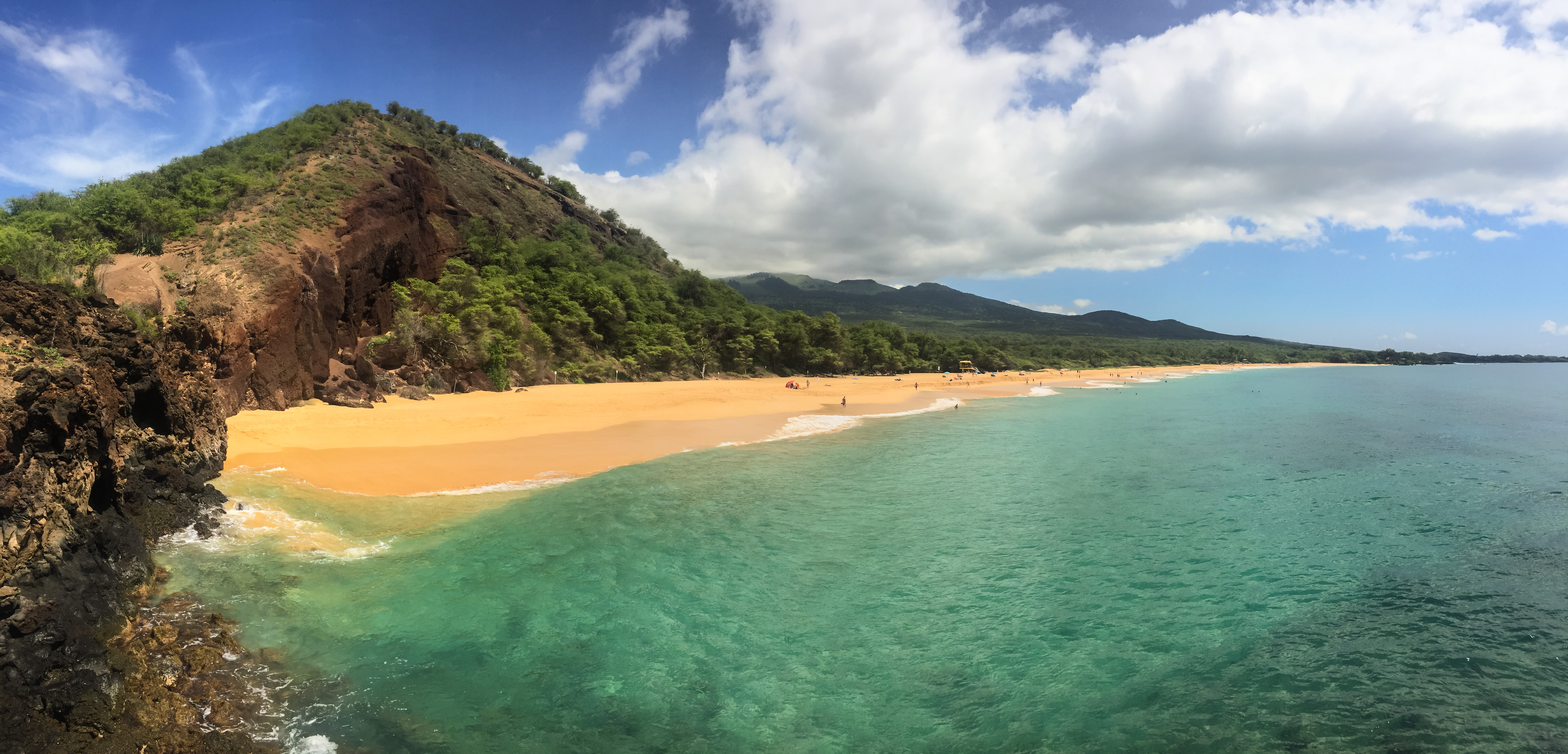 Hawaii Maui Makena Big Beach